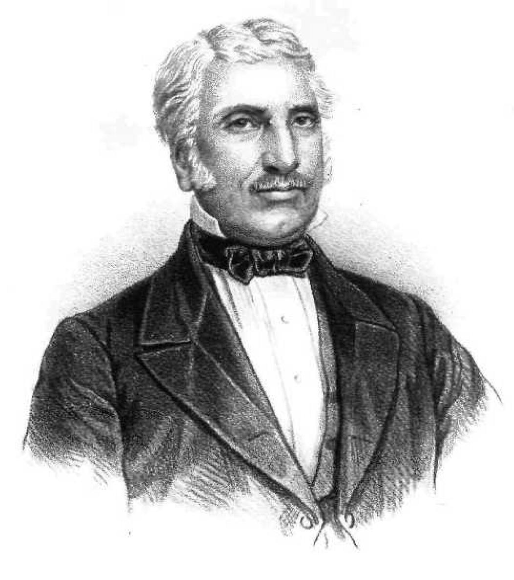 Griechischer politiker, 19. Jahrhundert